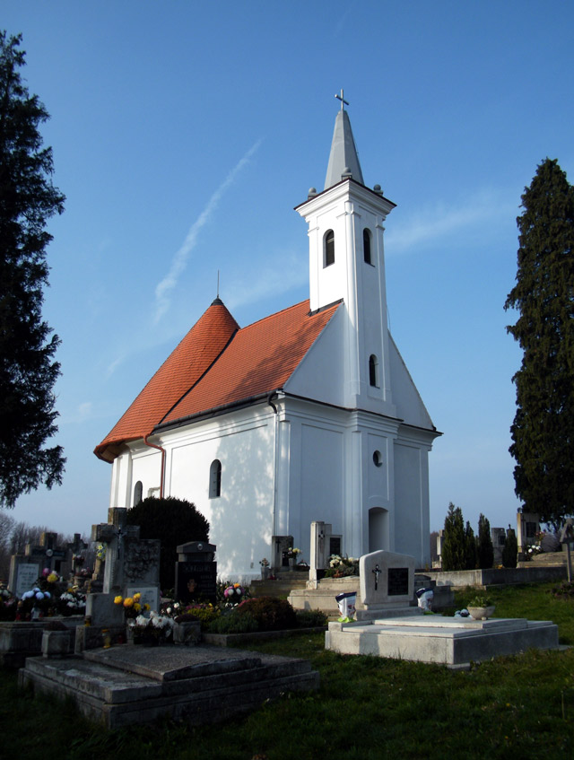 Szent Pál templom, Bagod-Szentpál (Vitenyédszentpál) This is a photo of a monument in Hungary. Identifier: 10758